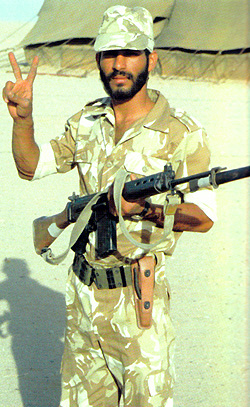 Kuwaiti soldier welding fn fal